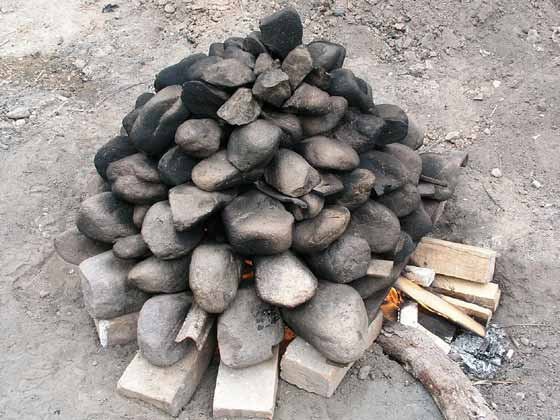 Pachamanca, calentando las piedras. Foto: Xauxa 2004 Categoría:Perú (imagen) Categoría:Imágenes GFDL Image:Pachamanca 1 - stones.jpg